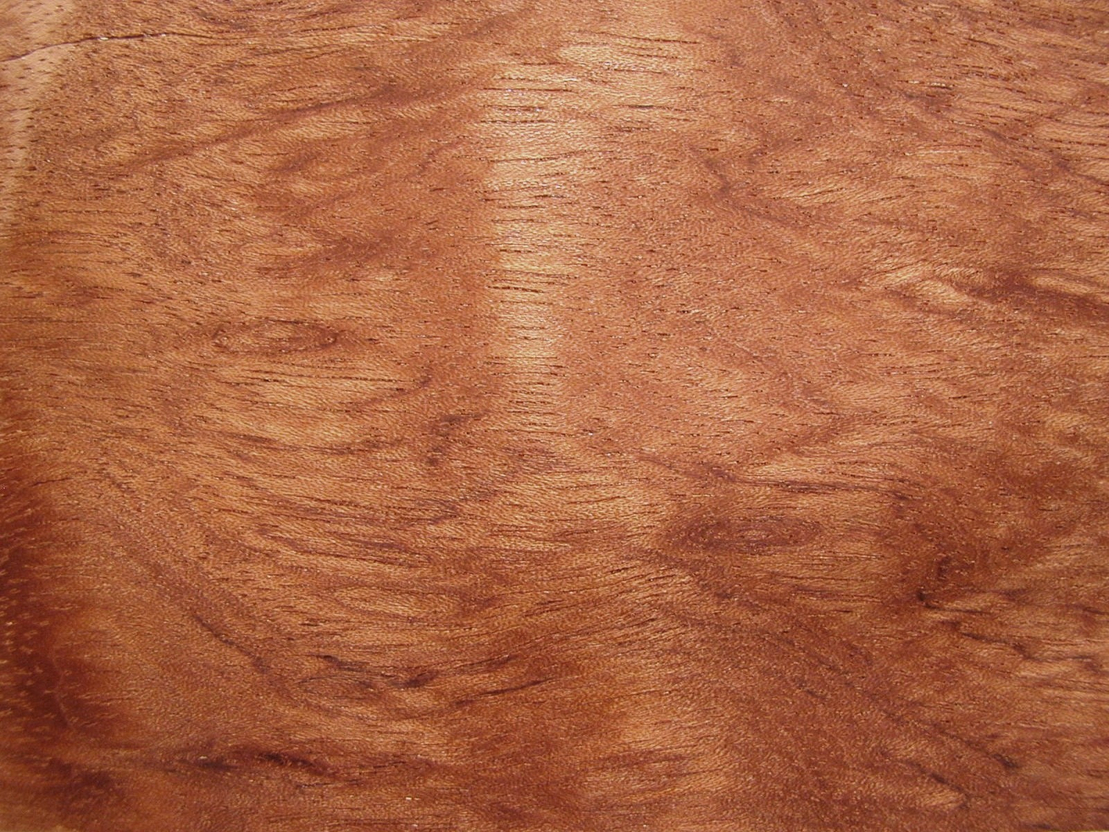 Bubingaholz, gemessertes Furnier, geölt, nicht geschliffen